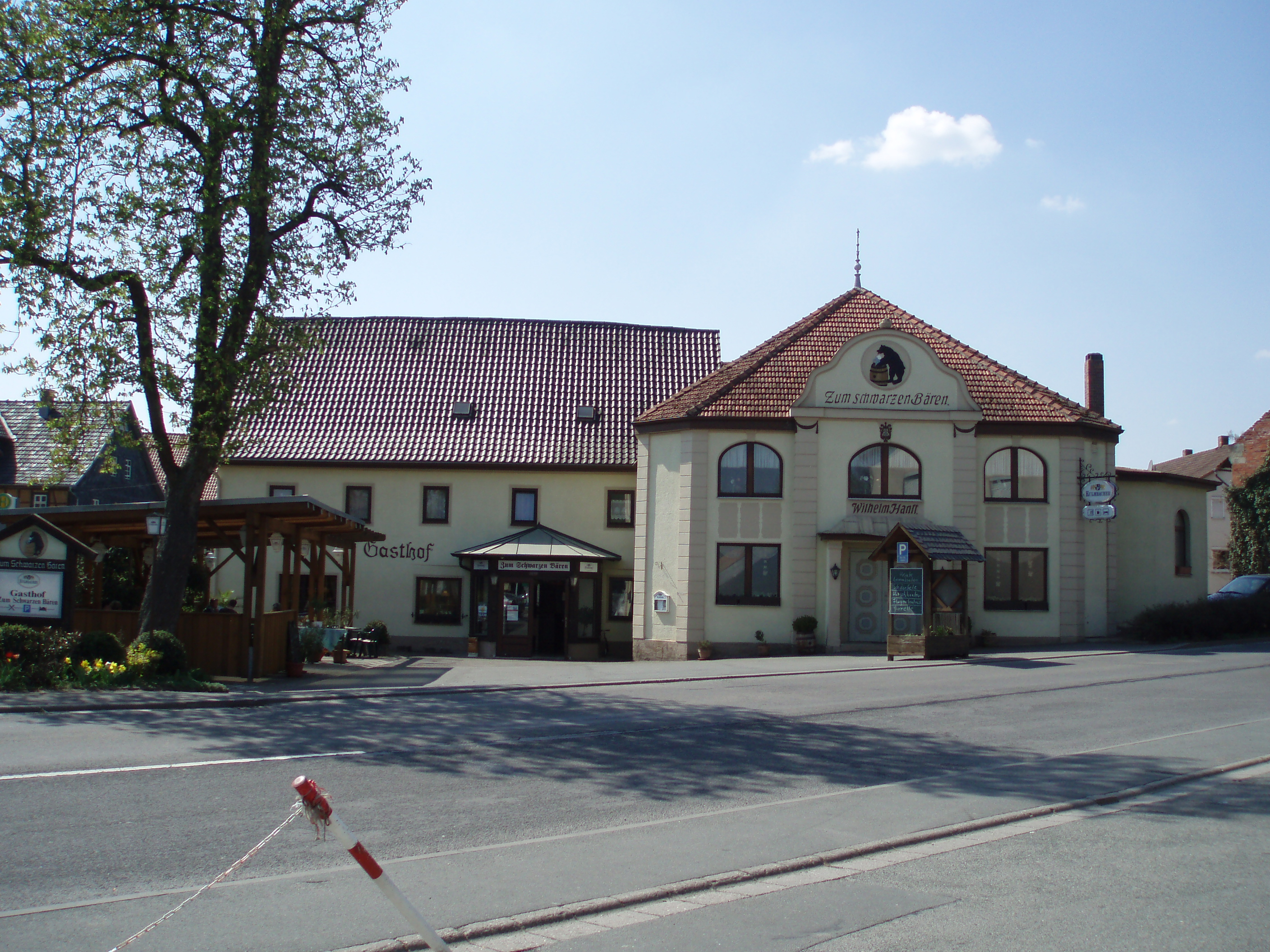 Fotoaktion Beiersdorf 12. April 2009, Bild 09 (original p4120009.jpg)